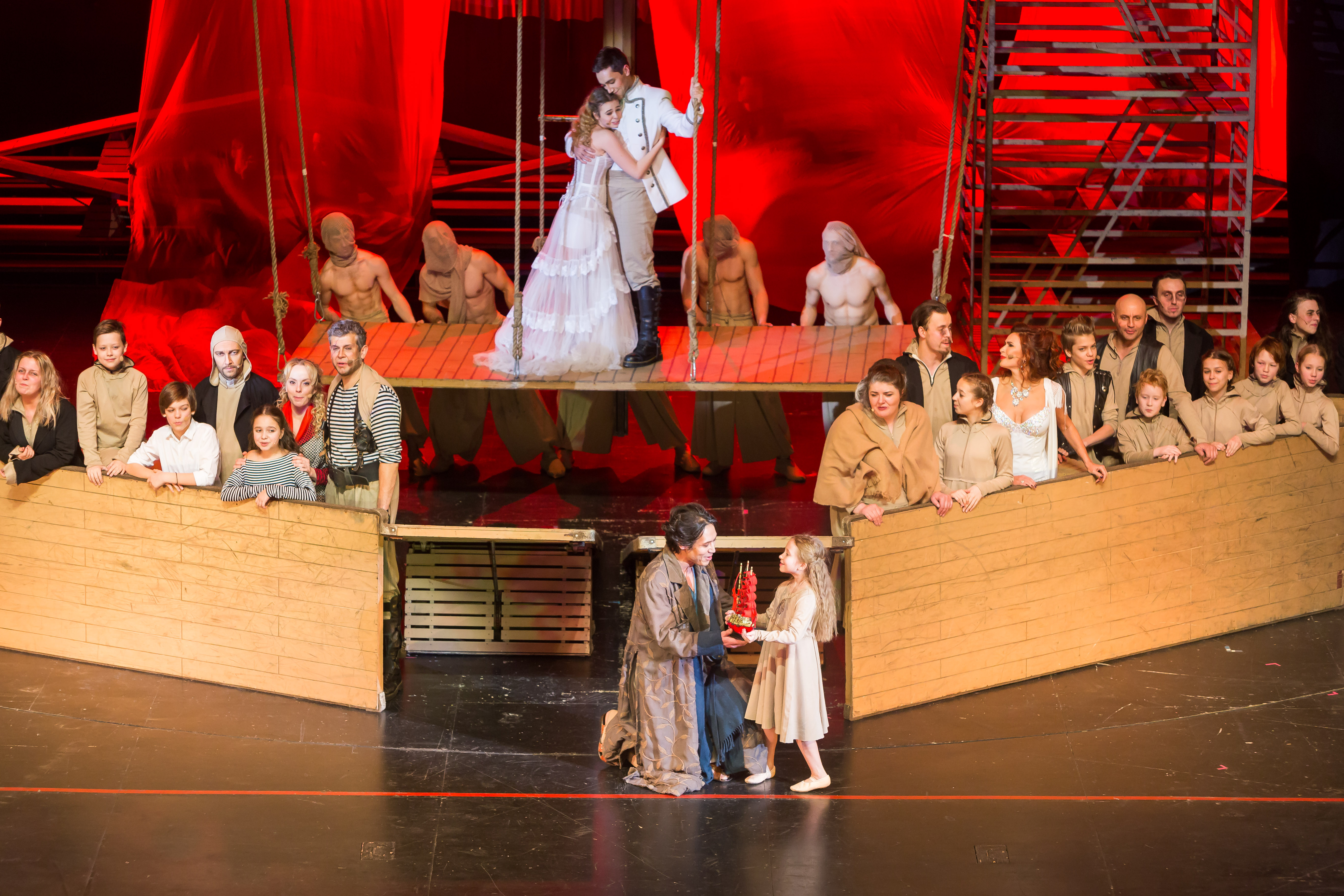 Сцена из мюзикла "Алые паруса"